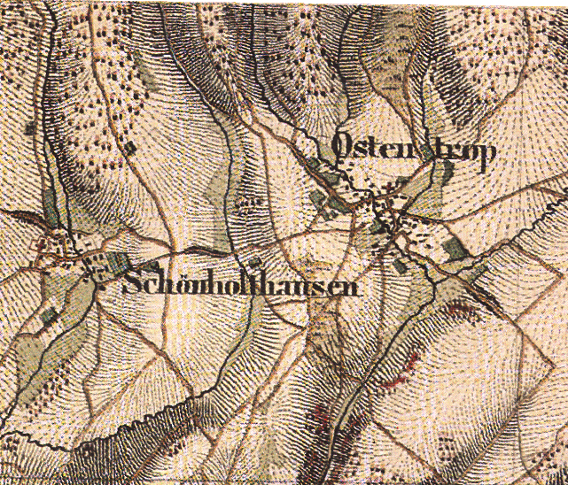 Ausschnitt Schönholthausen und Ostentrop, preußische Uraufnahme, Historika 25